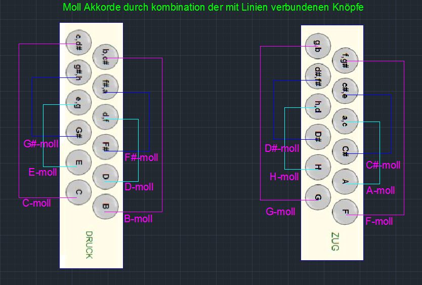 Basstastenbelegung einer Schrammelharmonika - Mollkombinationen